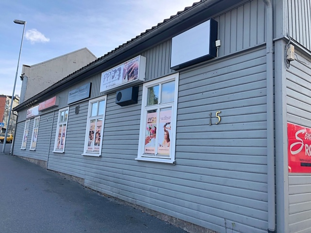 Welhavens gate 15, Moss